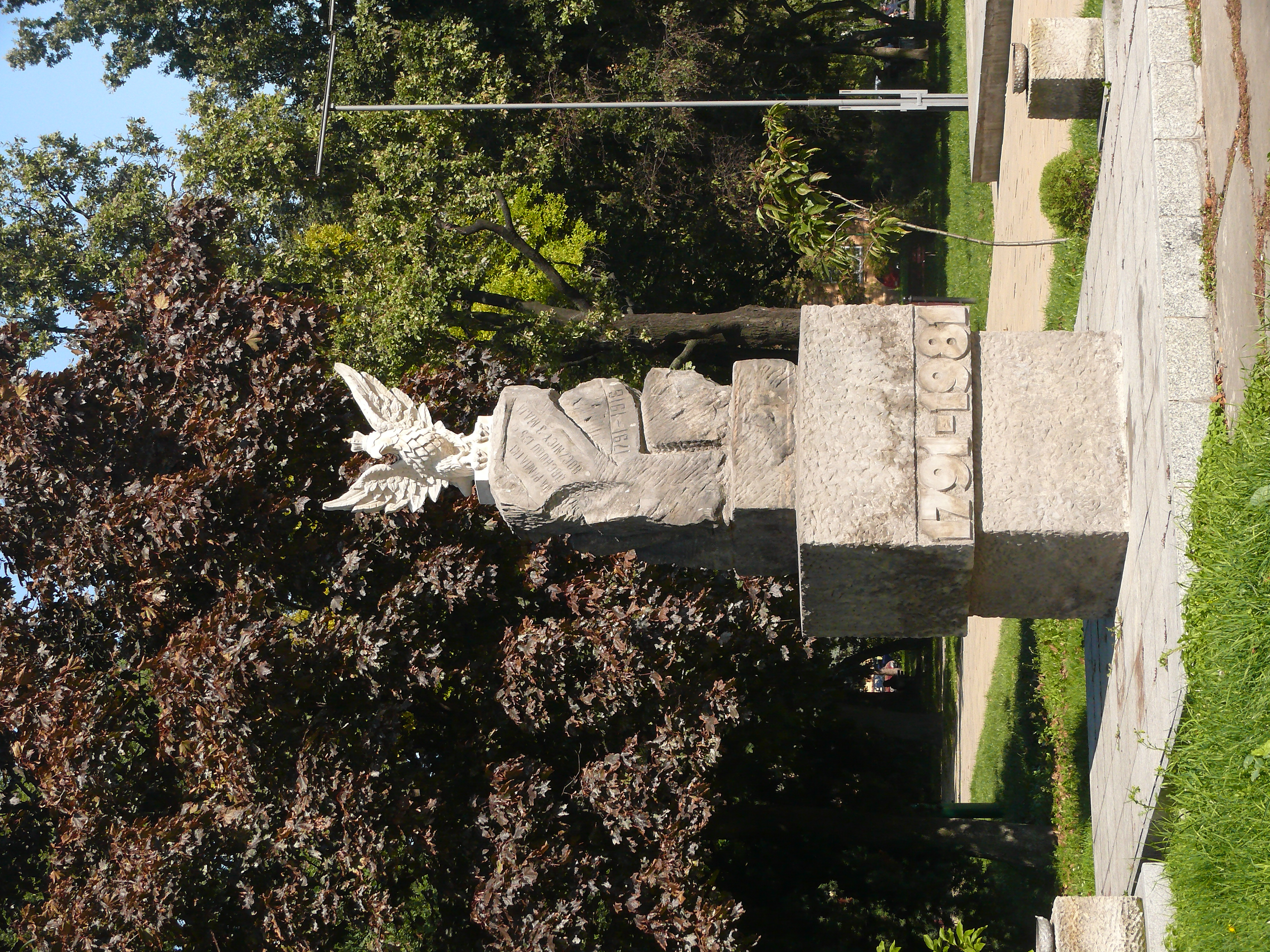 Pomnik Konstytucji 3 Maja, znajduje się w Lublinie, na Placu Litewskim, przy zbiegu ulic: 3 Maja i Krakowskiego Przedmieścia